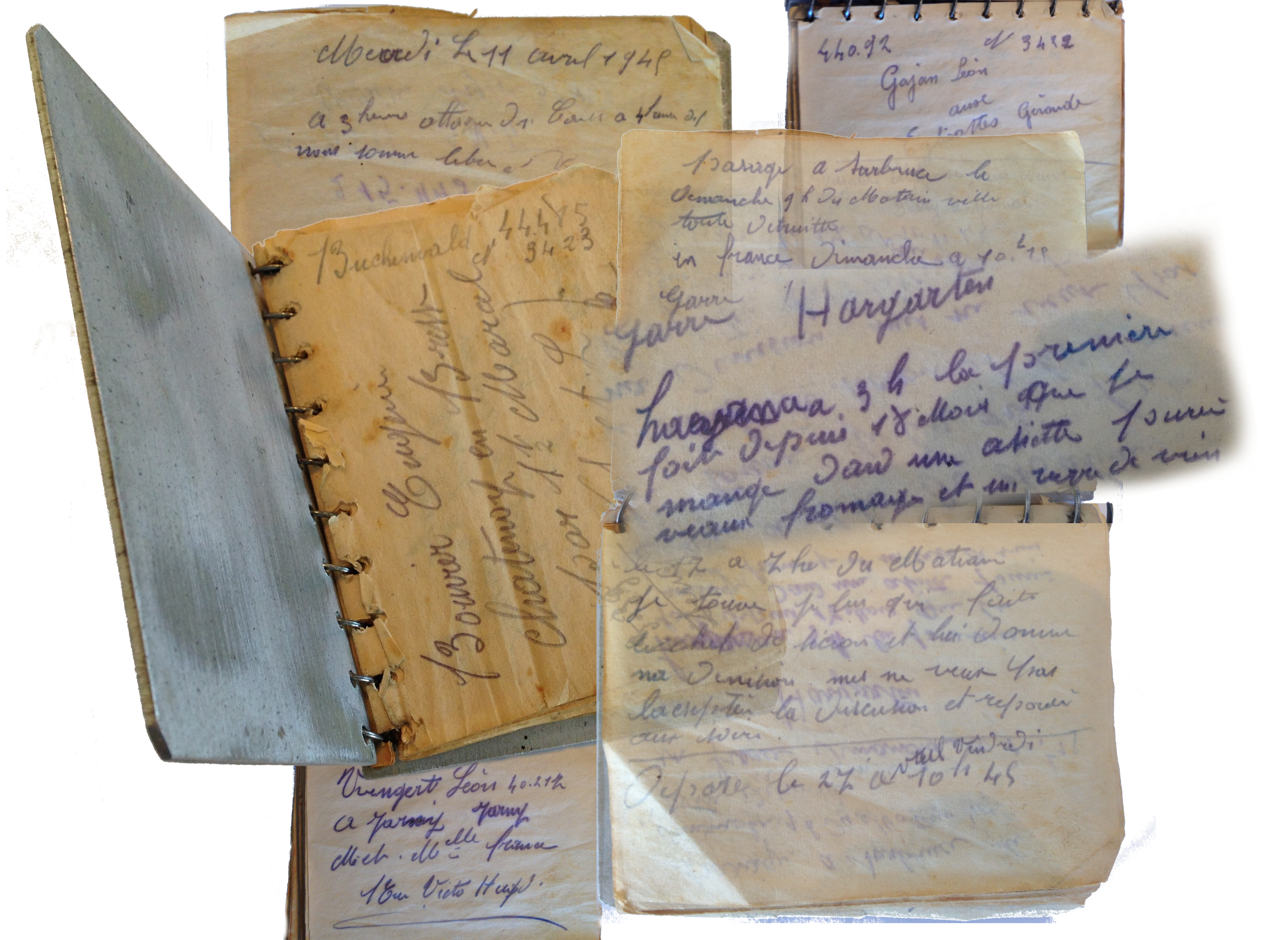 Carnet personnel tenu par Eugène Bouvier lors de son internement au KL Buchenwald, nous pouvons y trouver la date de libération du camp, la date de son départ du camp, détails son retour, nom d'autres déportés etc. Nous pouvons lire: "Gare Hargarten // la première fois depuis 18 mois que je mange dans une assiette fournie, veau, fromage et un verre de vin"